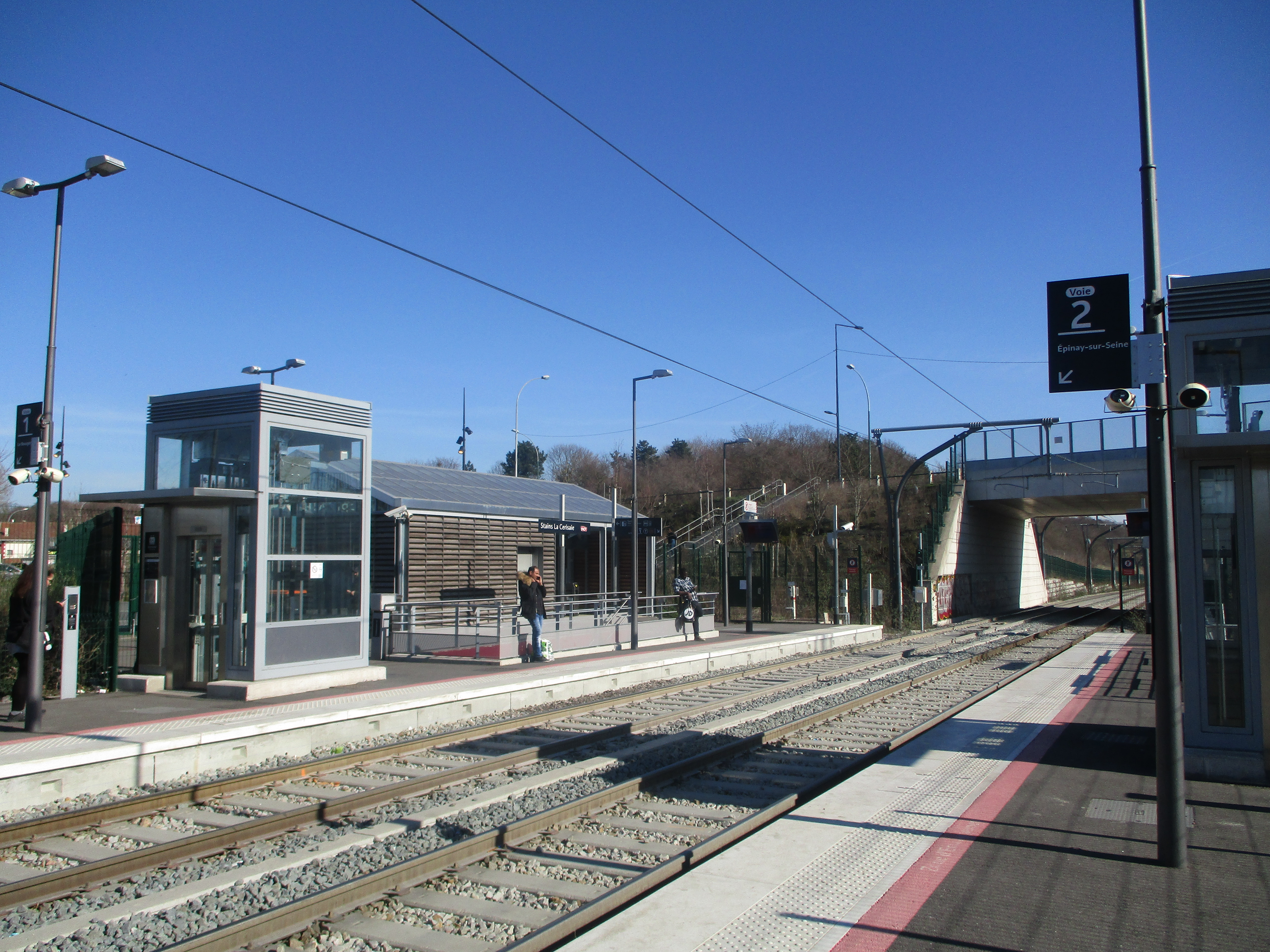 Gare de Stains-la Cerisaie. Ligne 11.